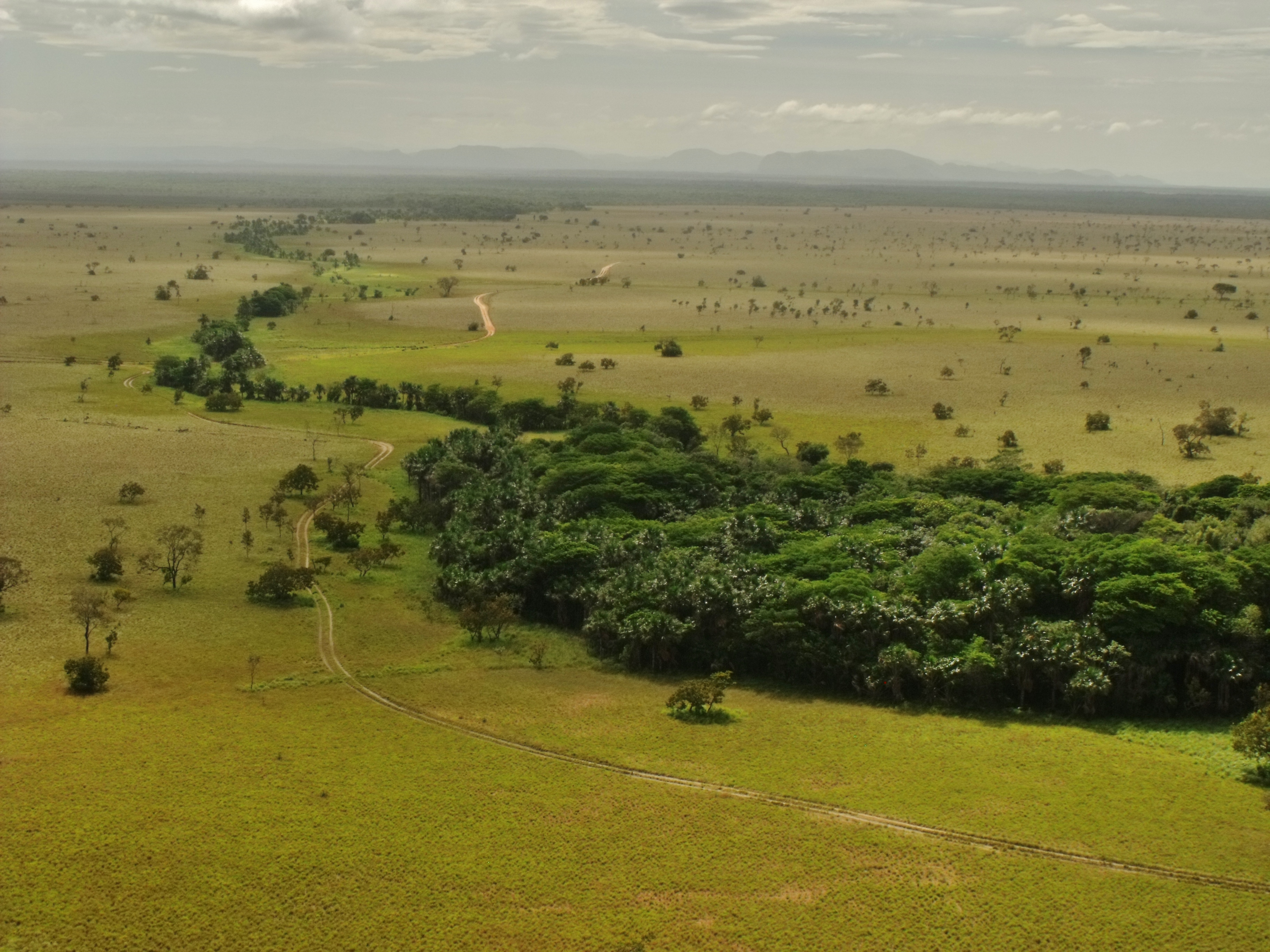 El canal de los ríos va generando una vegetación más boscosa en contraste a la sabana. Galeras del Cinaruco. Parque nacional Santos Luzardo